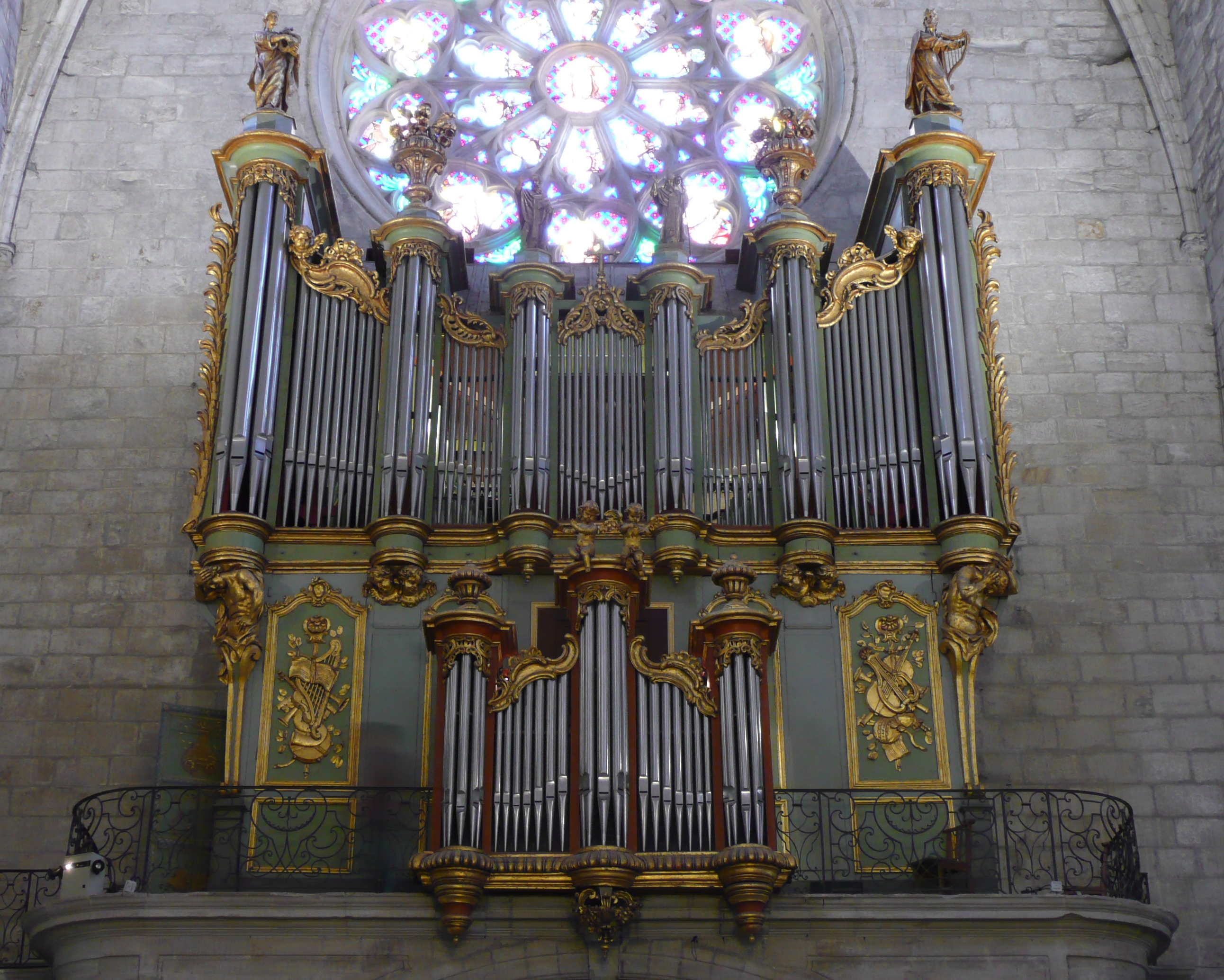 une des 7 Merveilles Organistiques de l'Hérault(avec Béziers,Montpellier St Pierre & N.D. des Tables,Pézenas,St Guilhem le Désert et St Pons de Thommières)due à Jean-François Lépine mais complètement transformé par Théodore Puget et fils en 1882,restauré en 2001 par la Manufacture Lodévoise de Grandes Orgues